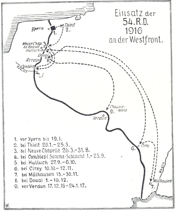 Karte Seite 51: Einsatz der 54. R.D. 1916 an der Westfront